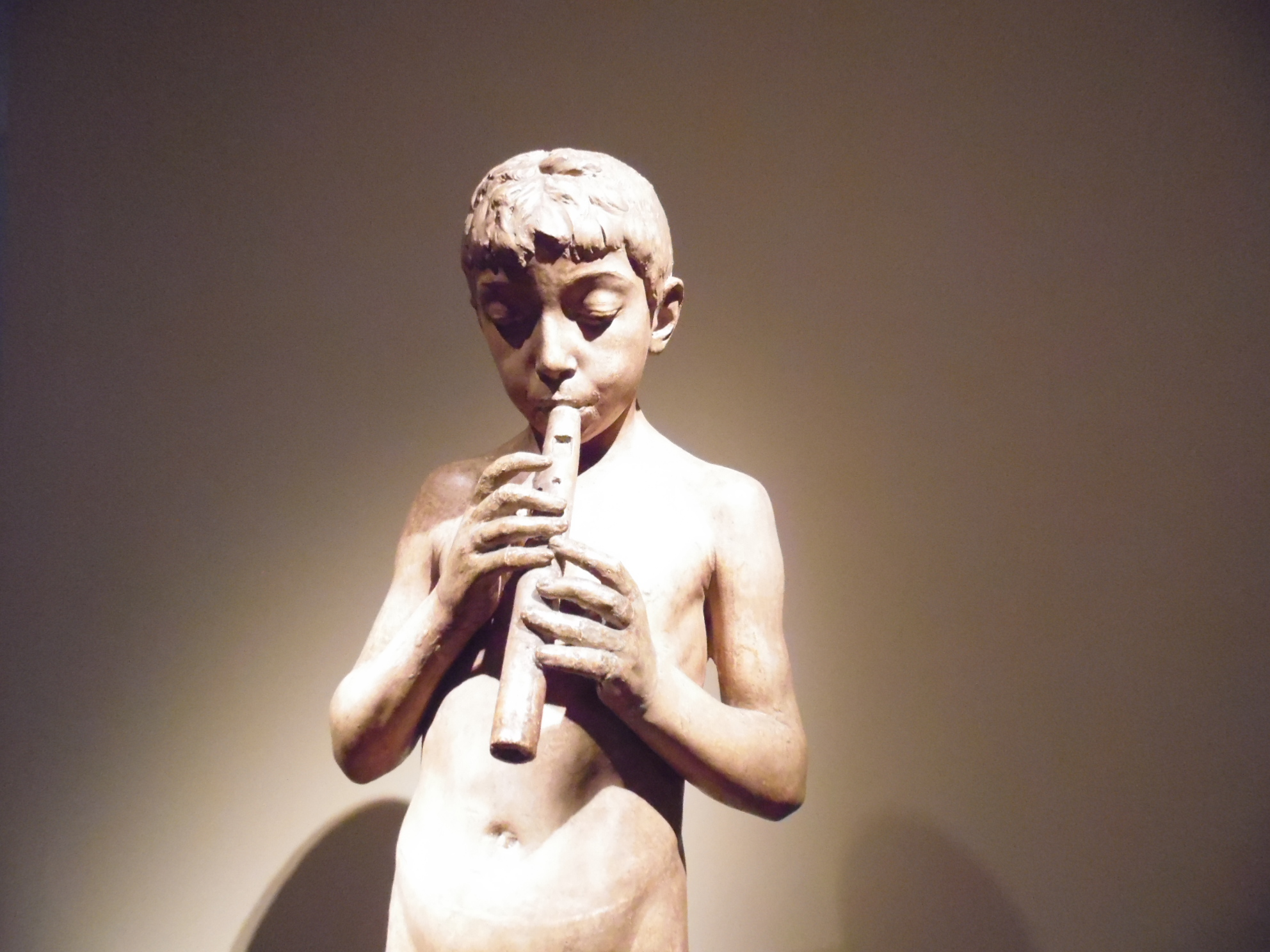 Benedetto Civiletti (Palermo, 1º ottobre 1845 – Palermo, 22 settembre 1899): Il Pifferaio (ca. 1890). Galleria d’Arte Moderna (Palermo)